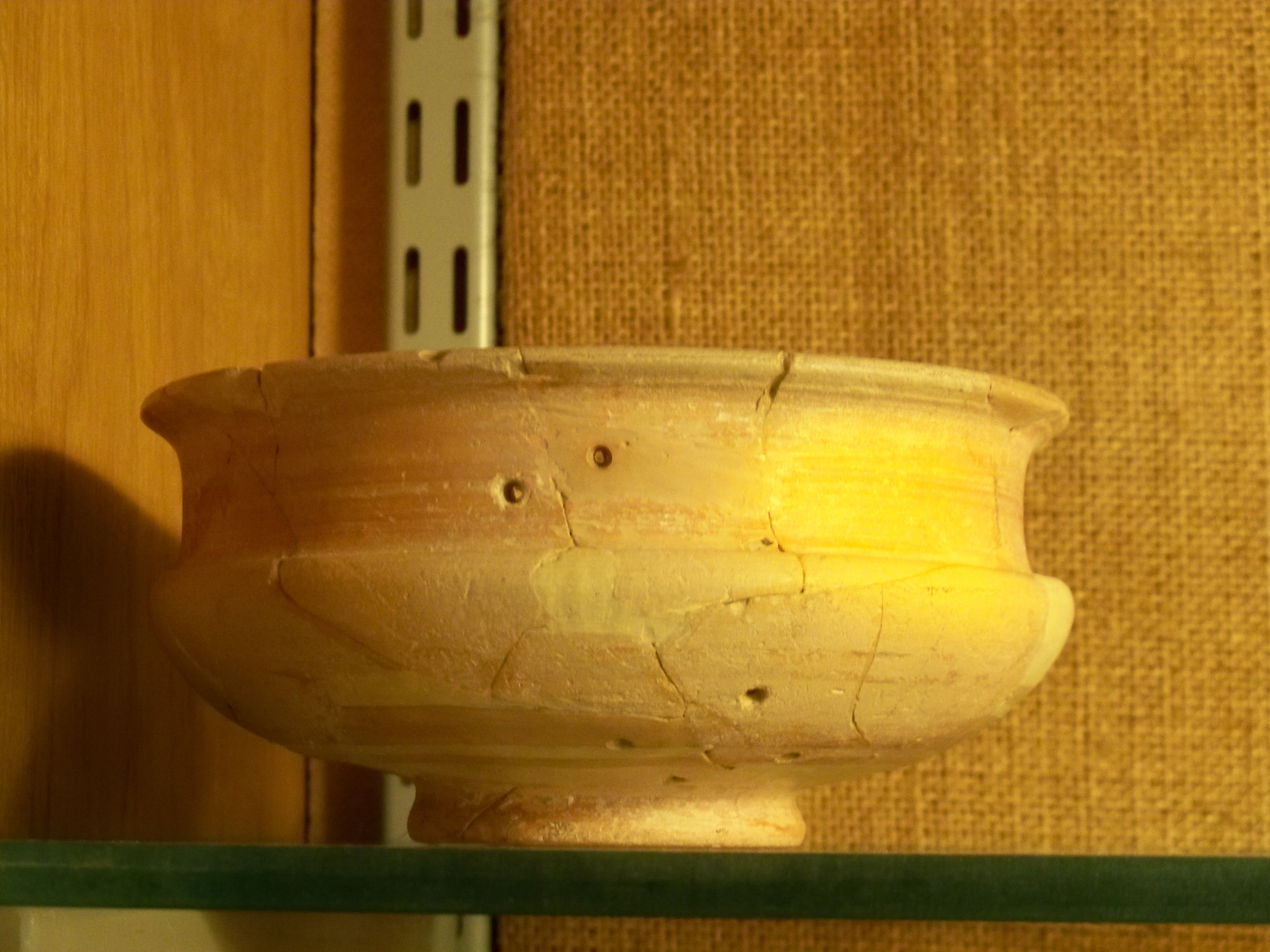 vase à vin au musée du Pègue, Drôme, France